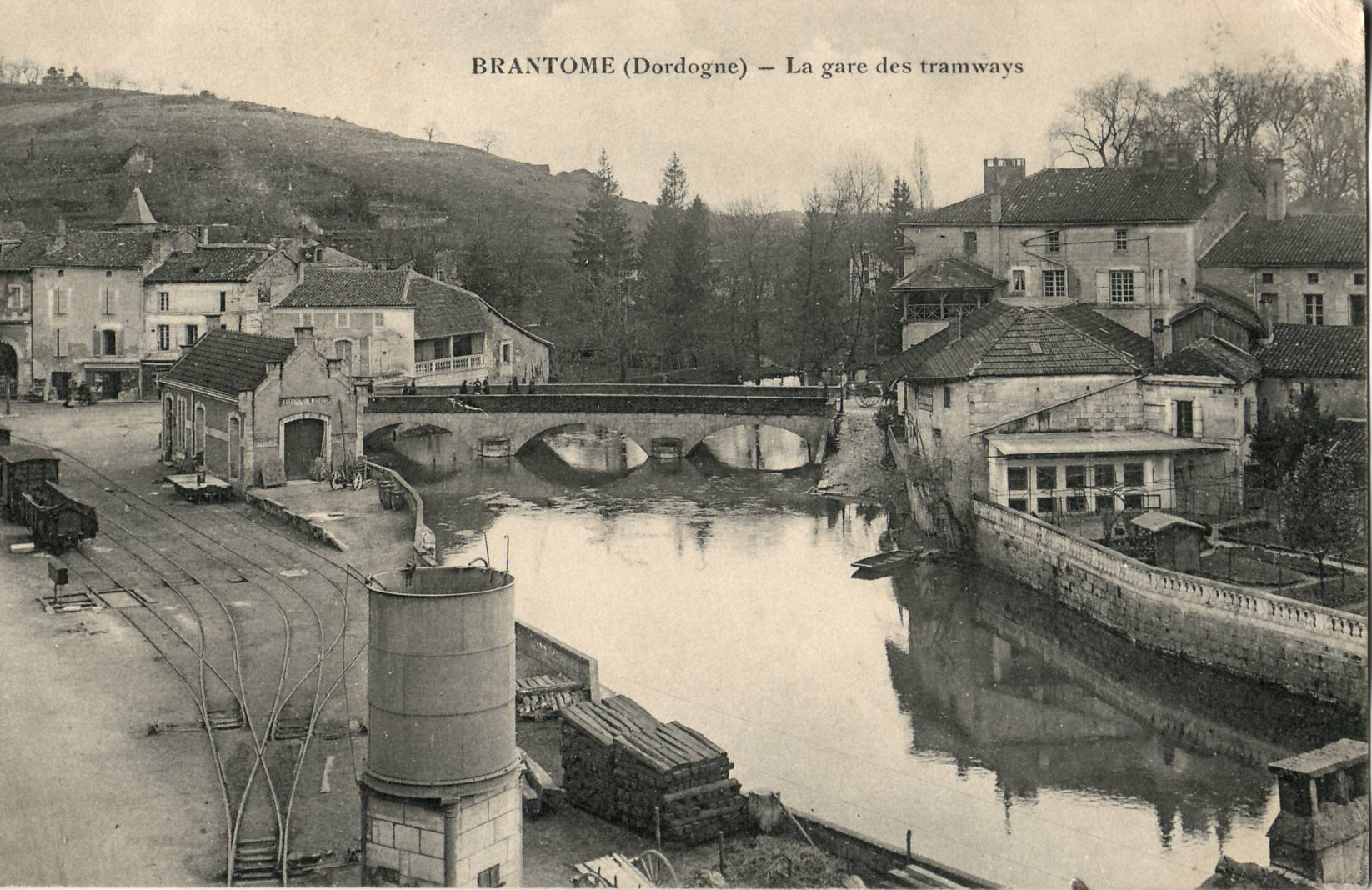 Carte postale ancienne, sans mention d'éditeur : BRANTÔME - La gare des tramways